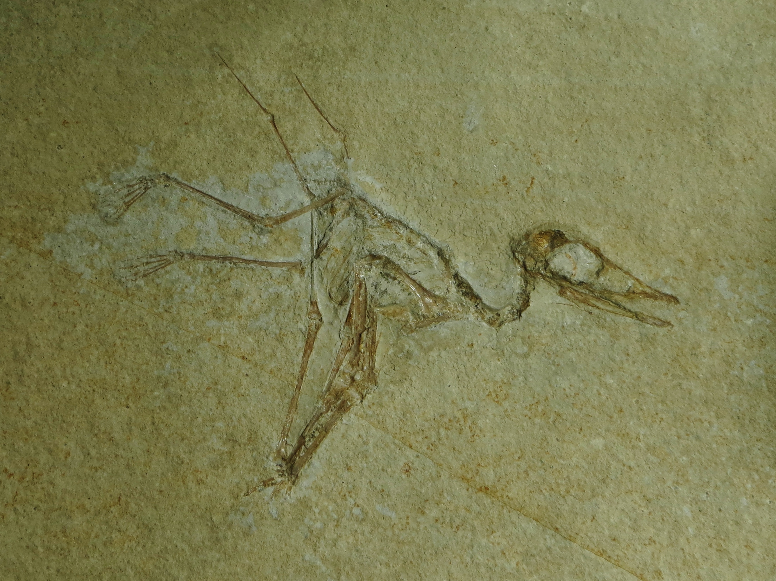 Fossil of Pterodactylus- Took the picture at Teylers Museum, Haarlem